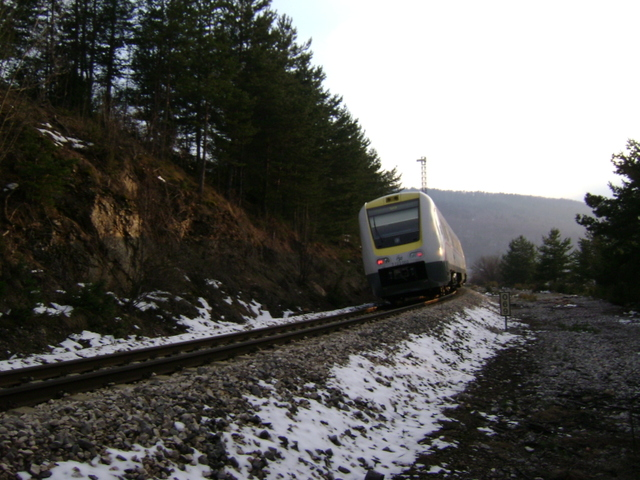 Nagibni prolazi Vrhovine